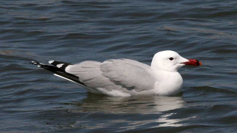 Audouin`s gull (Larus audouinii)